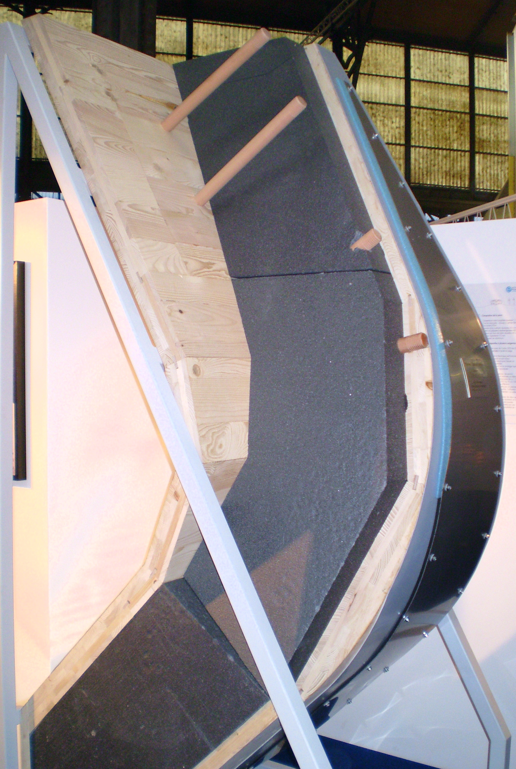 Base antarctique Princesse Elisabeth, prémontée et présentée au public le lendemain de son inauguration - ancienne gare maritime de Tour et Taxis, à Bruxelles - coupe de la paroi de la station avec isolation en polystyrène expansé